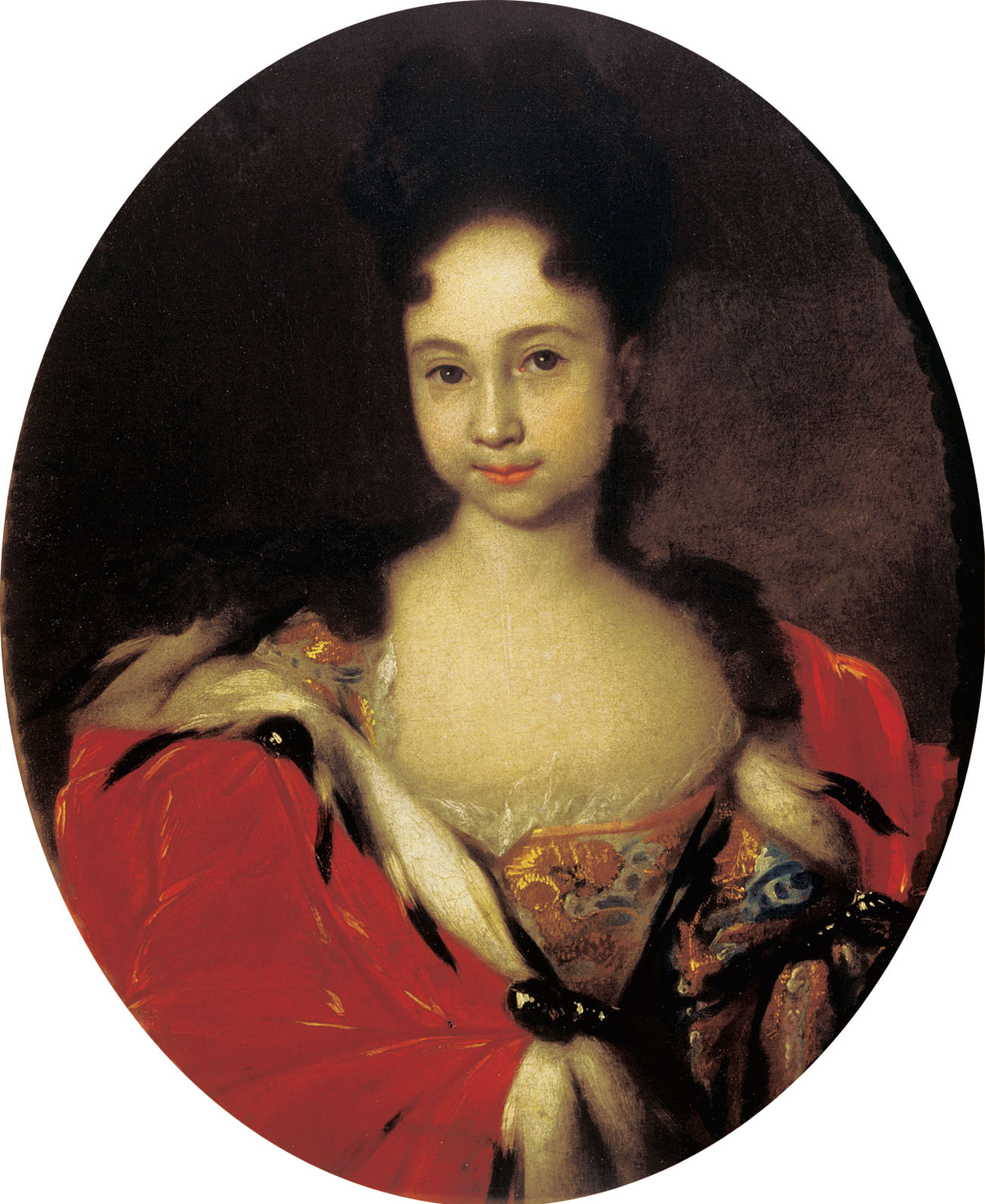 Портрет цесаревны Анны Петровны. Не позднее 1716. ГТГ На портрете цесаревне около шести-семи лет, но она причесана и одета, как взрослая дама. В портрете видны следы парсунного письма. Никитин еще нарушает многие европейские правила изображения человека. Это прежде всего сказывается в отступлениях от анатомической точности, прямой перспективы, нет полноценной иллюзии глубины пространства, светотеневой моделировки формы.